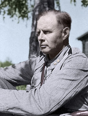 Jalkaväkirykmentti 9:n komentaja Bertel Ikonen